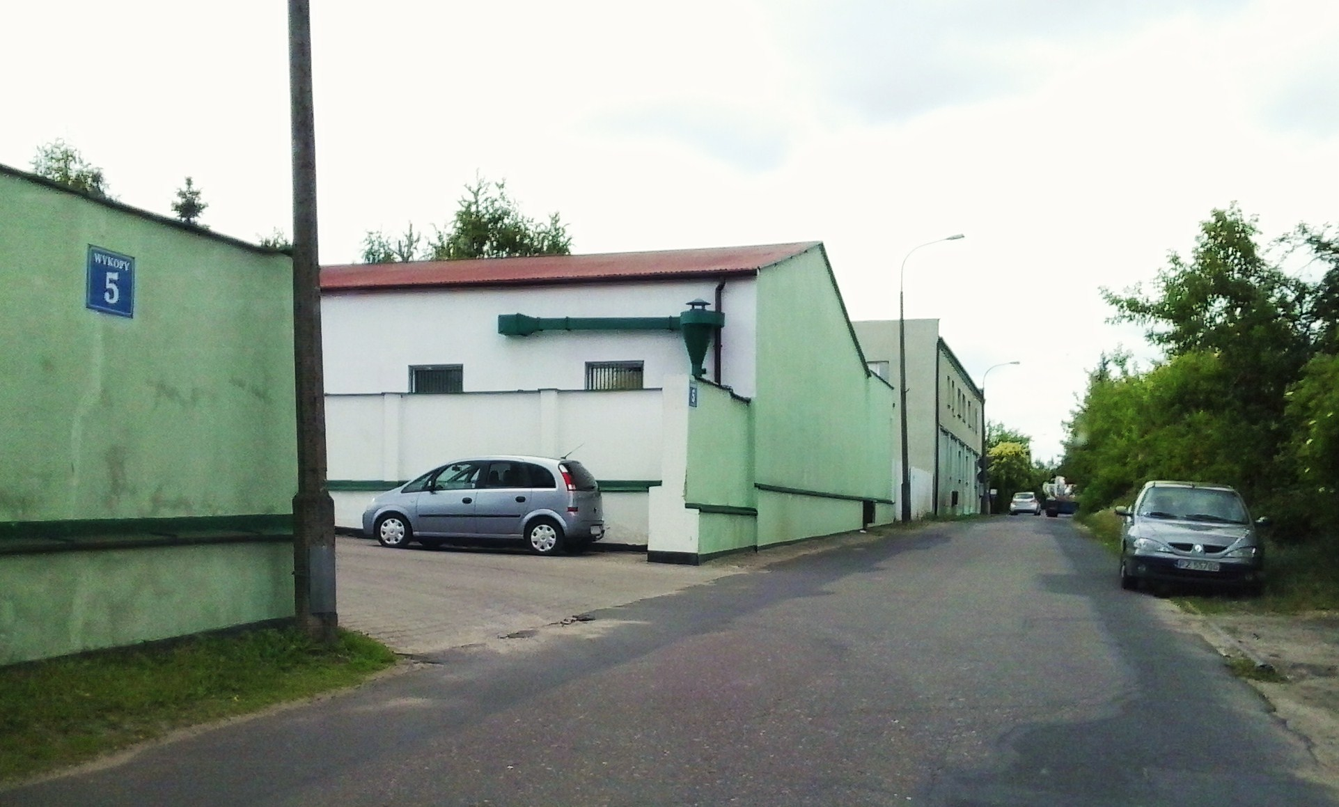 Stara huta miedzi w Poznaniu. Rudnicze.